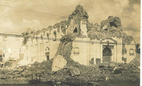 La Recolección en 1918